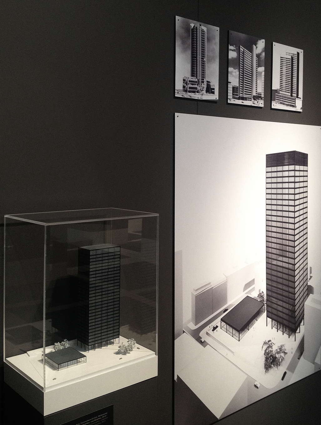 Wettbewerbsentwurf Commerzbank-Hochhaus, Frankfurt am Main von Ludwig Mies van der Rohe, 1968 in der Ausstellung "Himmelstürmend. Hochhausstadt Frankfurt" im Deutschen Architekturmuseum, Frankfurt am Main (08.11.2014–19.04.2015).